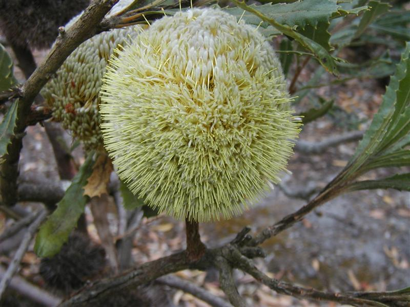 Banksia laevigata laevigata, Banksia Farm, Mt Barker